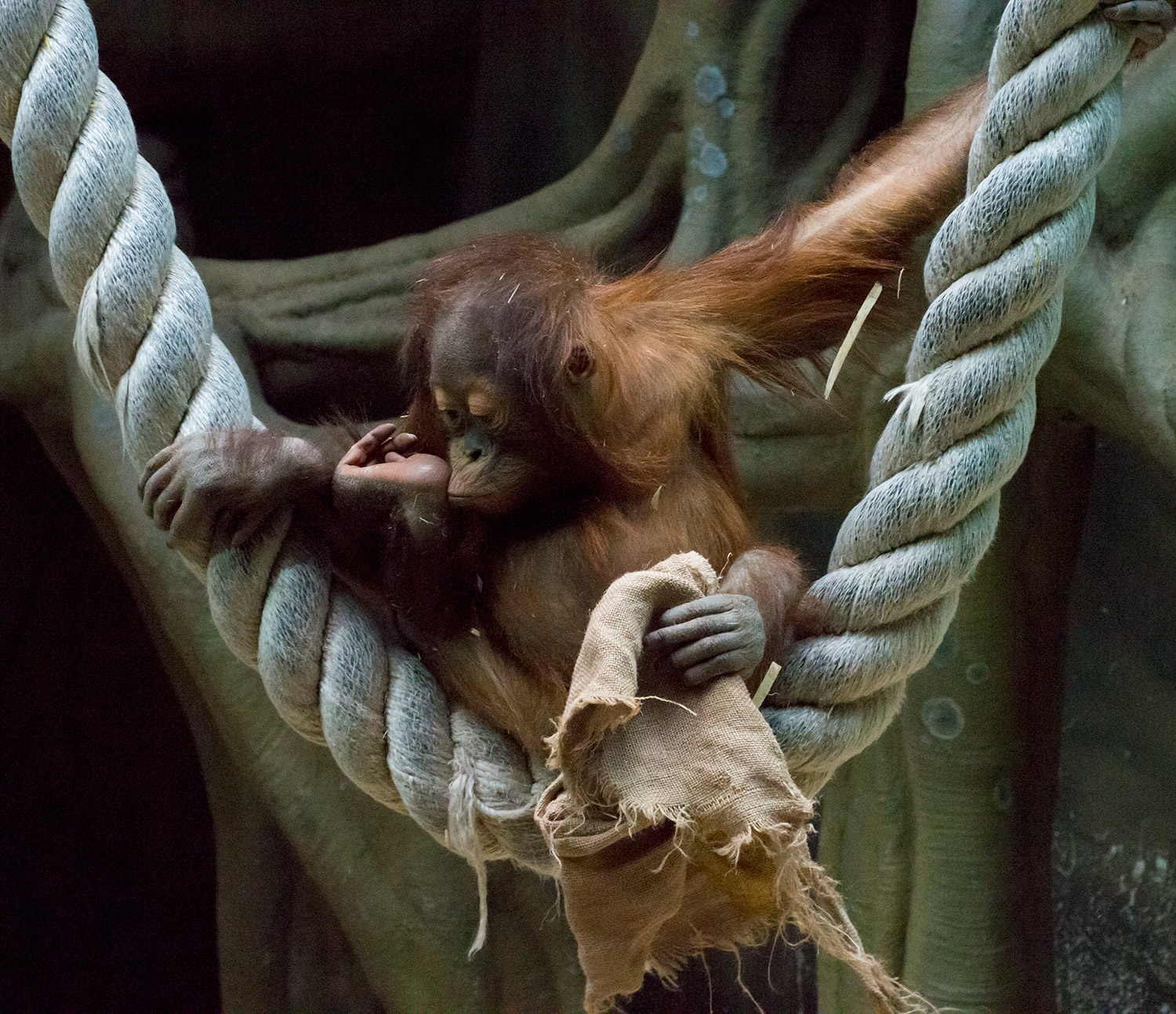 orangután de Sumatra en el parque zoológico de Moscú.